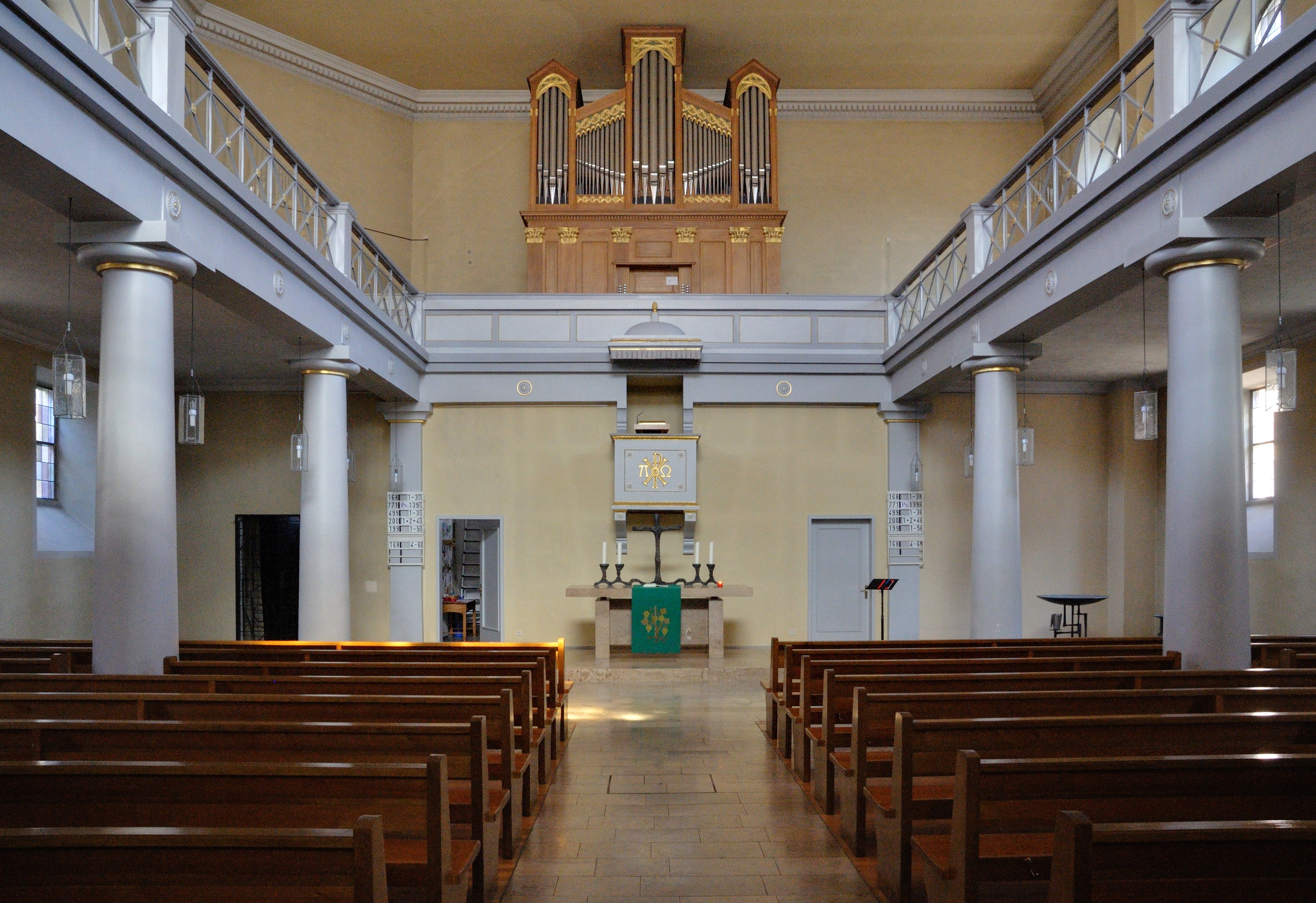 Lörrach: Innenraum der Evangelischen Stadtkirche